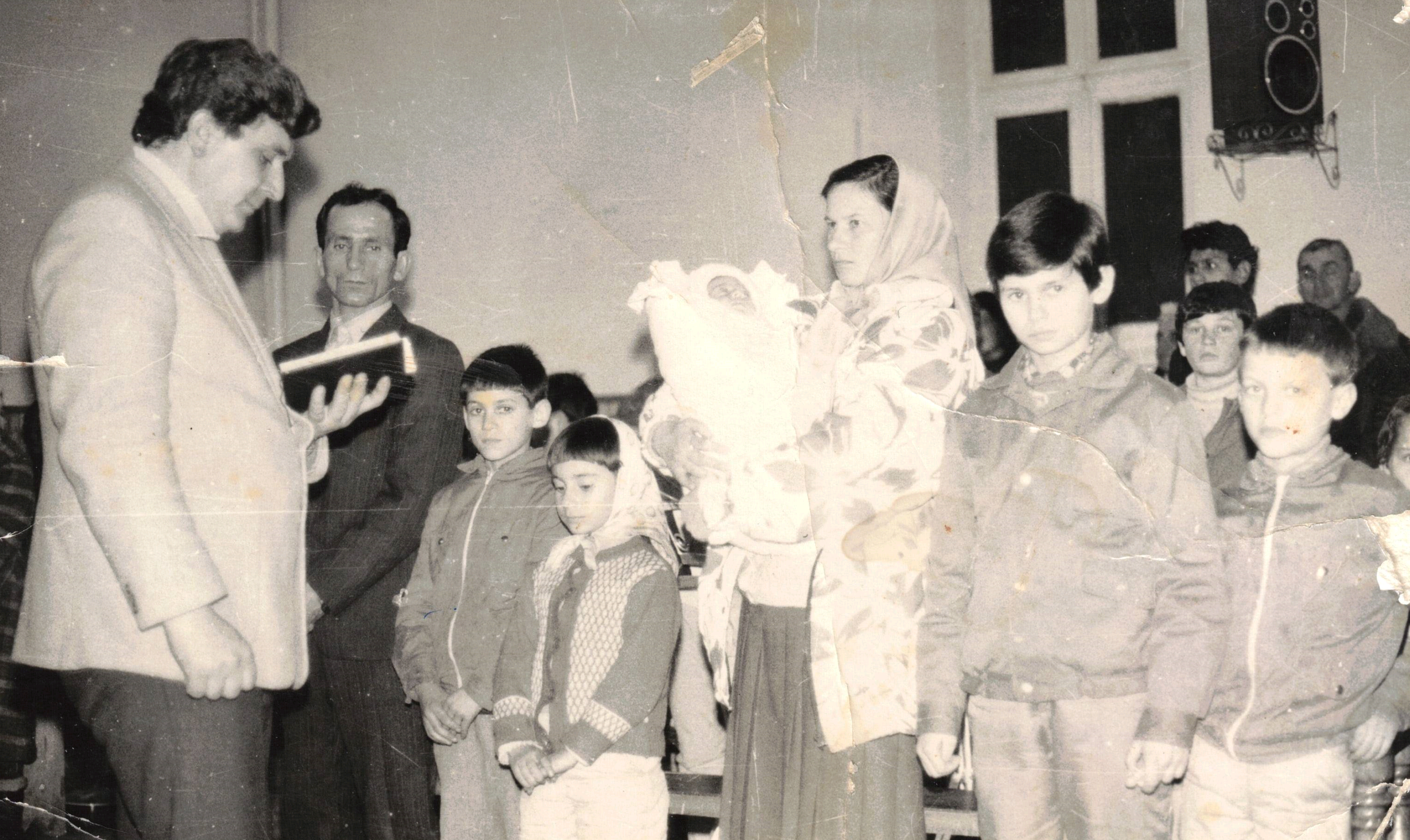 Familia Antal